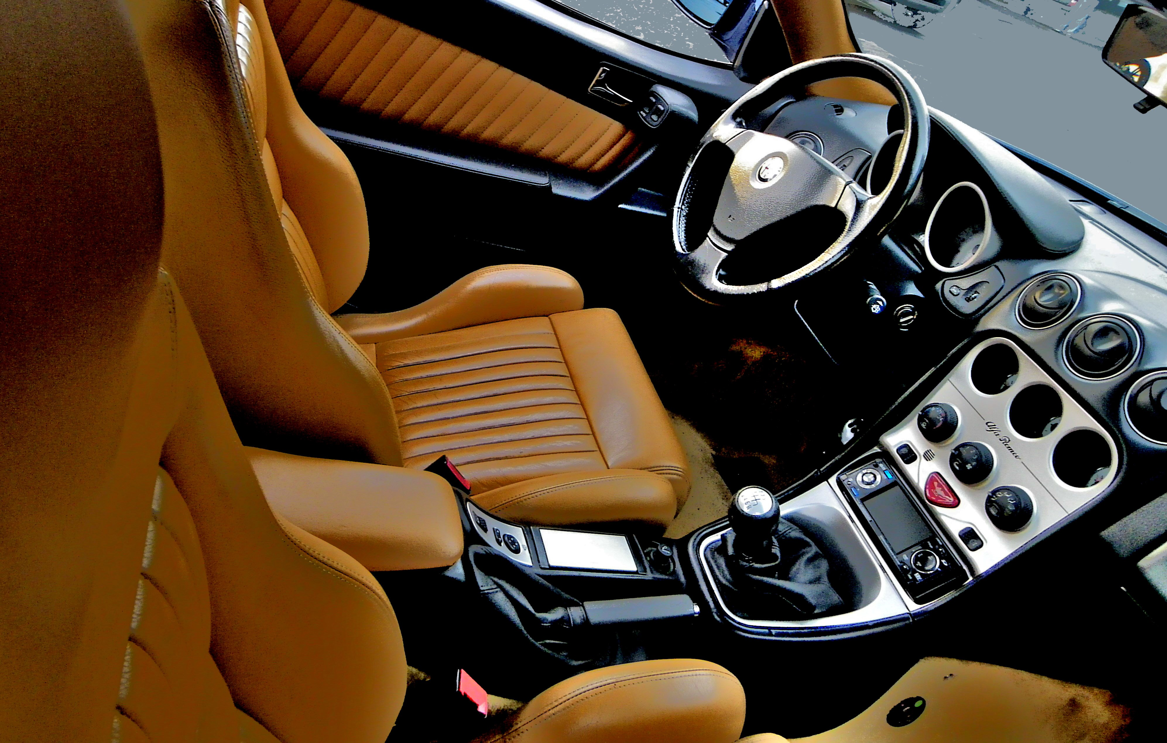 Interior Alfa Romeo Gtv (916) V6 Turbo Lusso (phase 2)